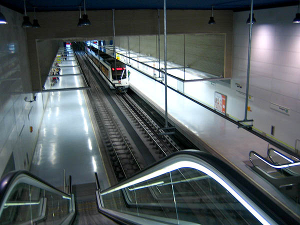 Estació de MetroValencia Aragón. Interior.